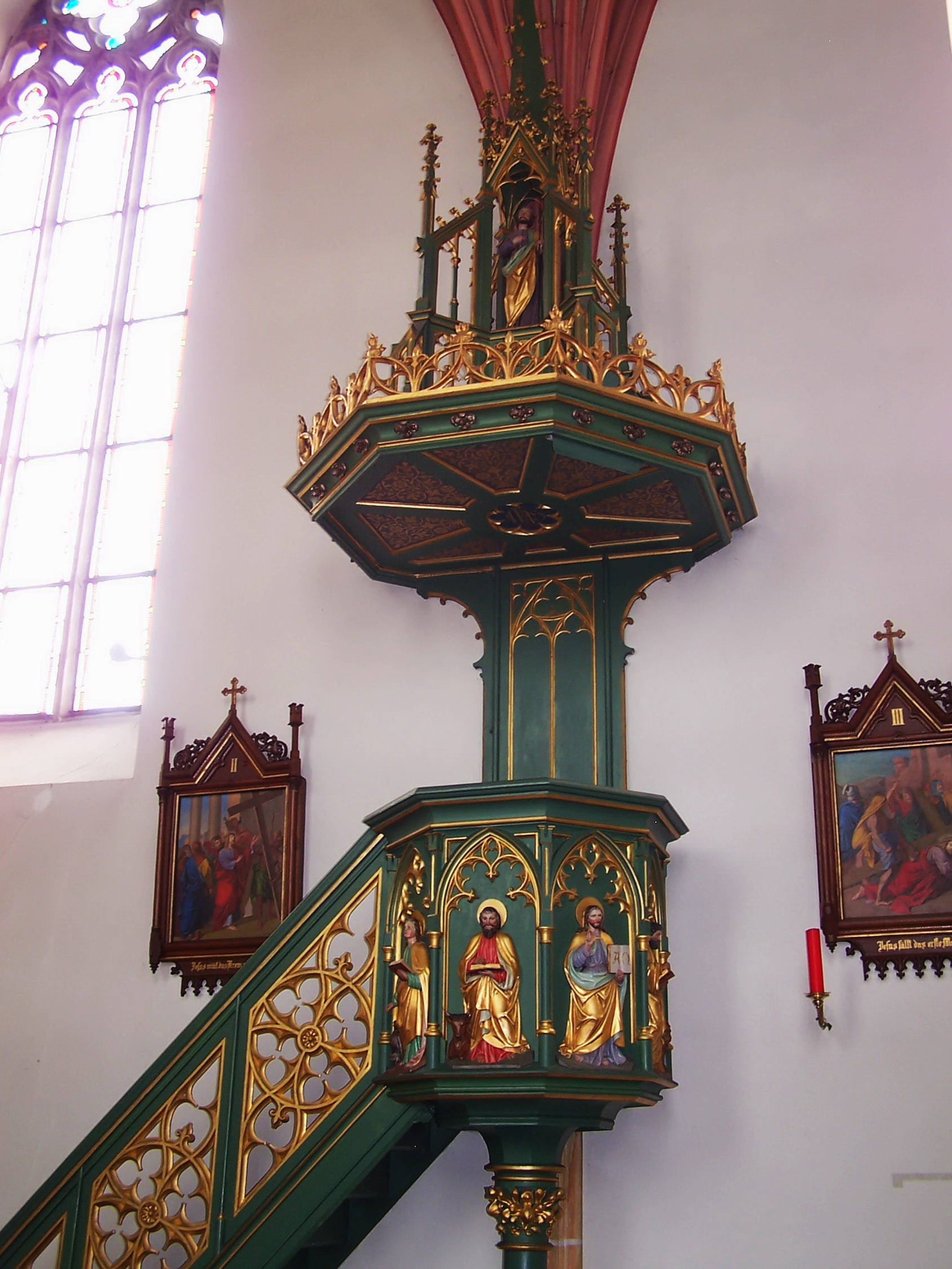 Wörth an der Donau. Hofdorf. Kath. Expositurkirche St. Michael. Polygone Kanzel im neugotischen Stil aus dem späten 19. Jh. In den Feldern Reliefs der vier Evangelisten.